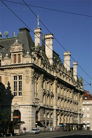 Lausanne: La Poste vis-à-vis de l'église St.François